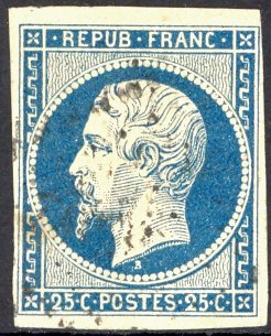 Timbre poste France 1852 Napoleon